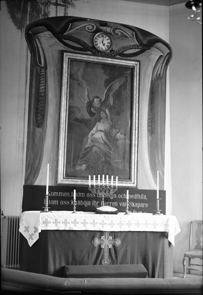 Altarprydnad, oljemålning på duk framställande Kristus i Getsemane. Före konservering. Kategori: (05) AltarprydnaderAltarprydnad, oljemålning på duk framställande Kristus i Getsemane. Före konservering.